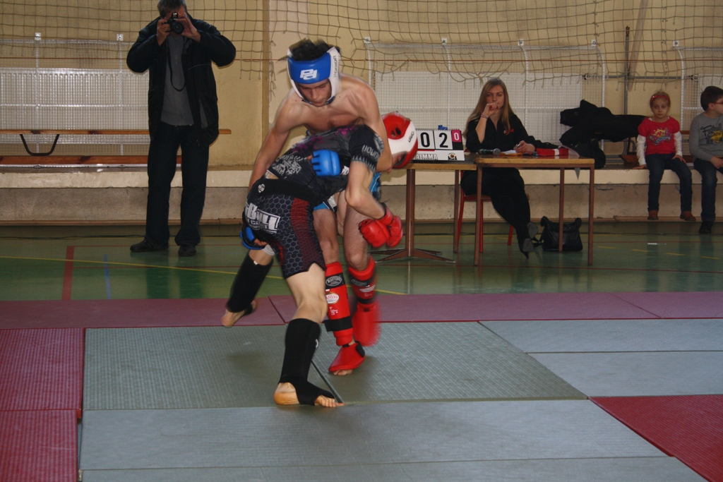 Zawody Amatorskiej ligi MMA 74 w Świętochłowicach - walki pierwszego kroku odbywające się na macie